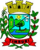 Brasão do município de Timburi